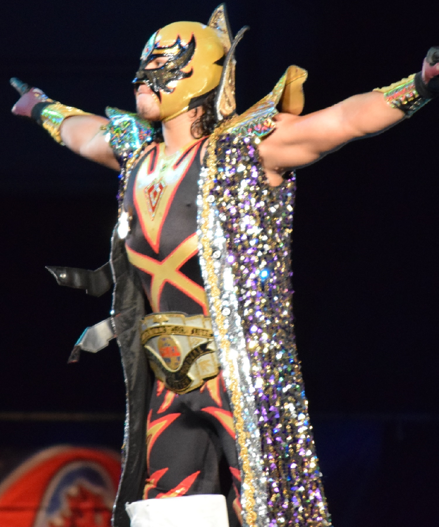 2015年8月1日 大阪府立体育会館 「G1 CLIMAX 25」 マスカラ・ドラダ